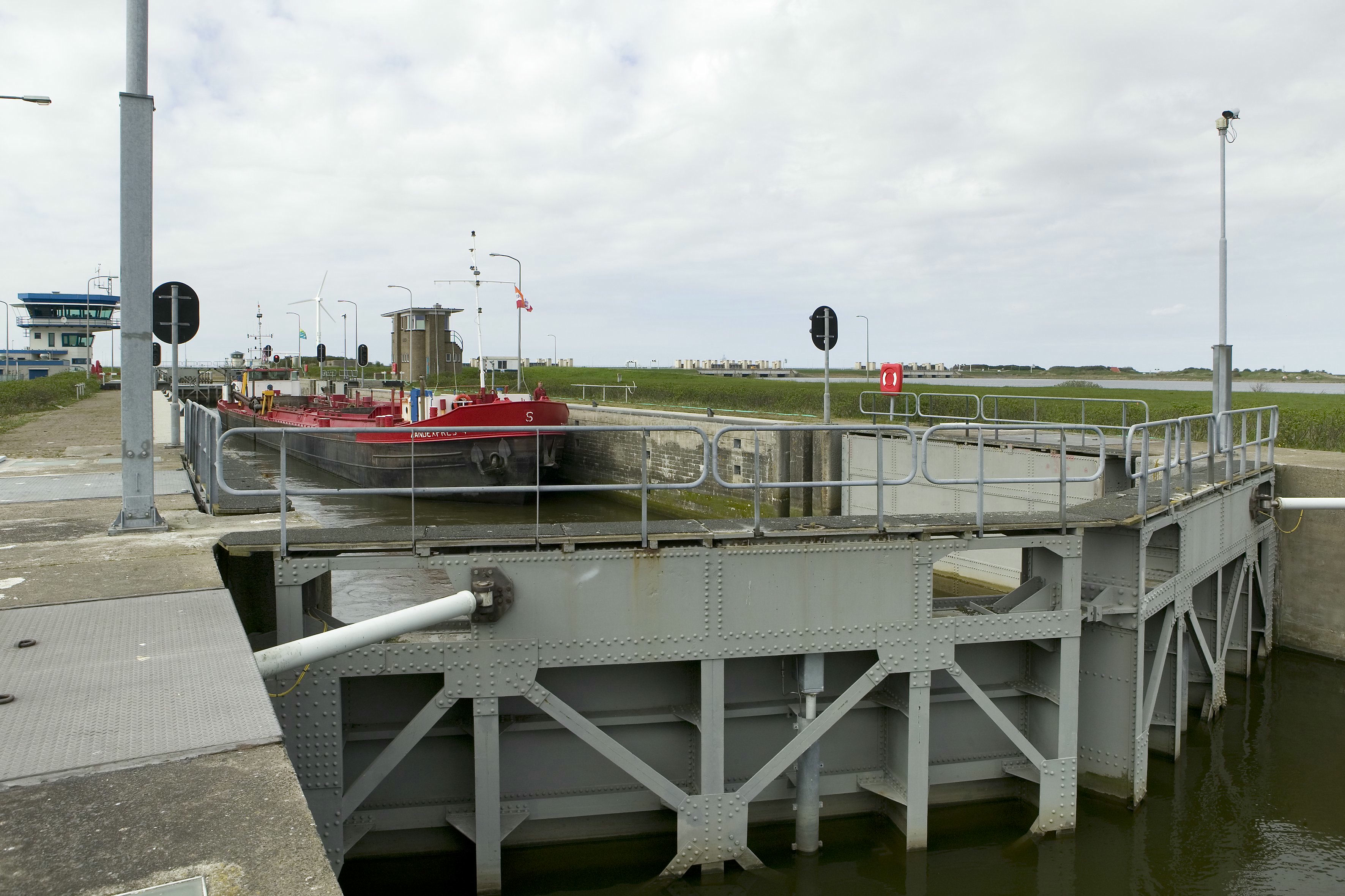 Stevinsluizen: Zicht op sluisdeuren